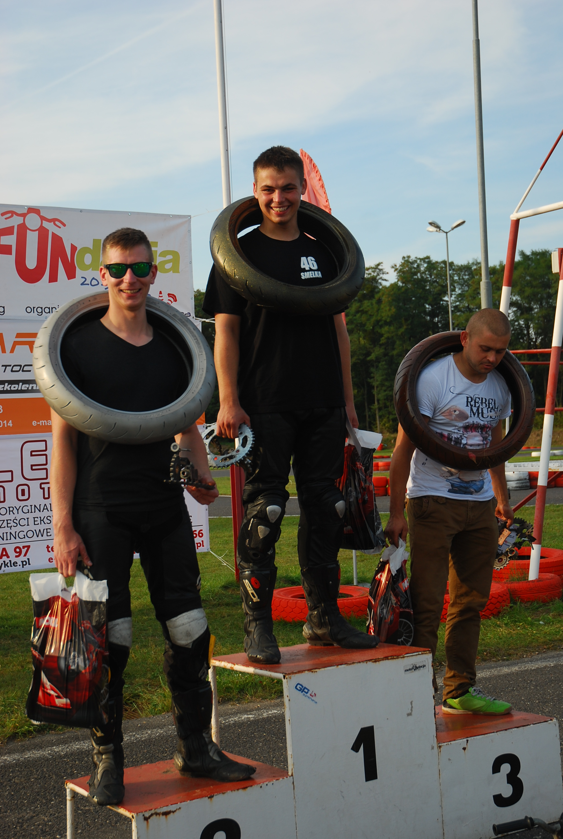 Podium klasyfikacji generalnej Mistrzostw Polski Gymkhana GP 2014. 1. miejsce - Smelka Tomek Smela. 2. miejsce - Dziki Krzysztof Dzikowski. 3. miejsce - Gruszka Grzegorz Uliński. Finał Gymkhana GP, 20 września 2014, Szczecin.